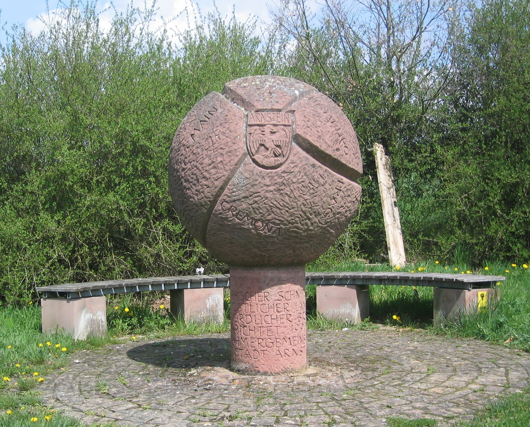 Schnittpunktdenkmal Gemarkung Schwebenried (Bayern/Unterfranken) - 50° 00′ n. Br., 10° 00′ ö. L